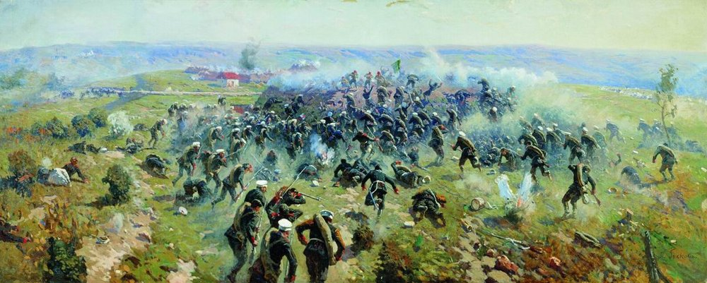 Атаката на гренадирския полк при Г.Дъбник.